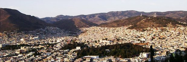 En un paseo no planeado por La Raza tras tomar un taxi me topé con esta panorámica. La cámara siempre dispuesta salió por la ventanilla para capturar esta vista que nunca había visto de la ciudad.